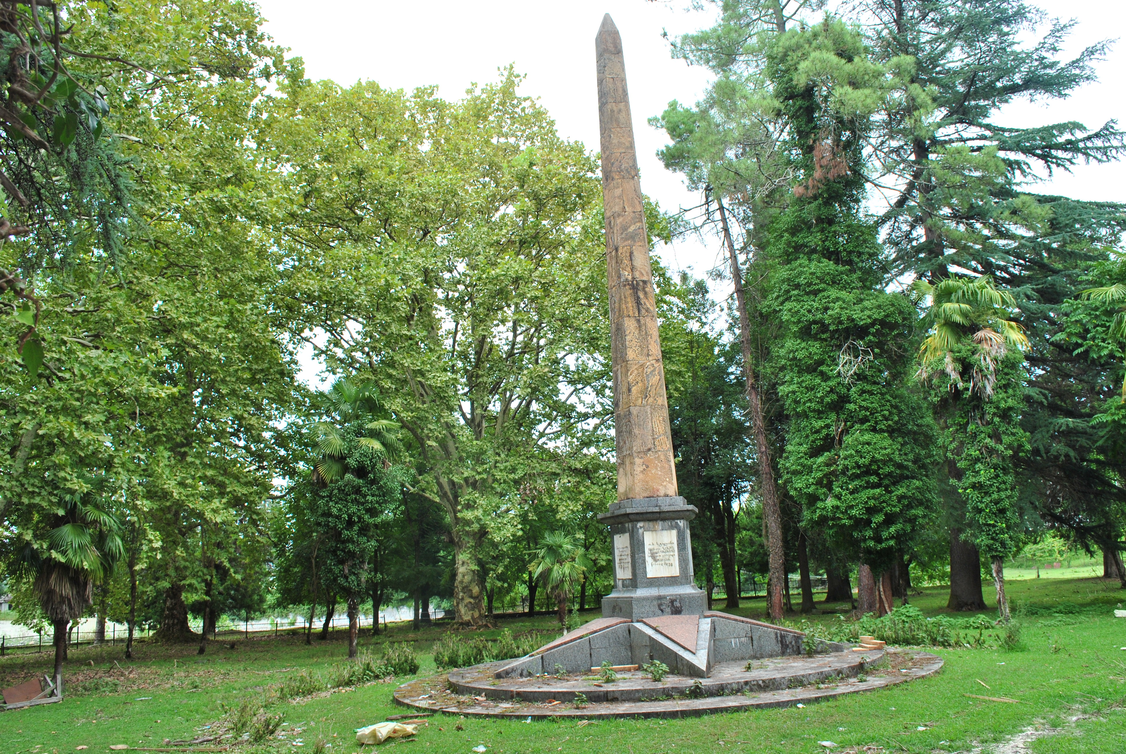 ობელისკი სოფელ ხიდისთავში მიძღვნილია იოსებ სტალინის სიტყვისადმი, რომელიც მან წარმოთქვა ამ სოფელში 1905 წლის რევოლუციის დროს